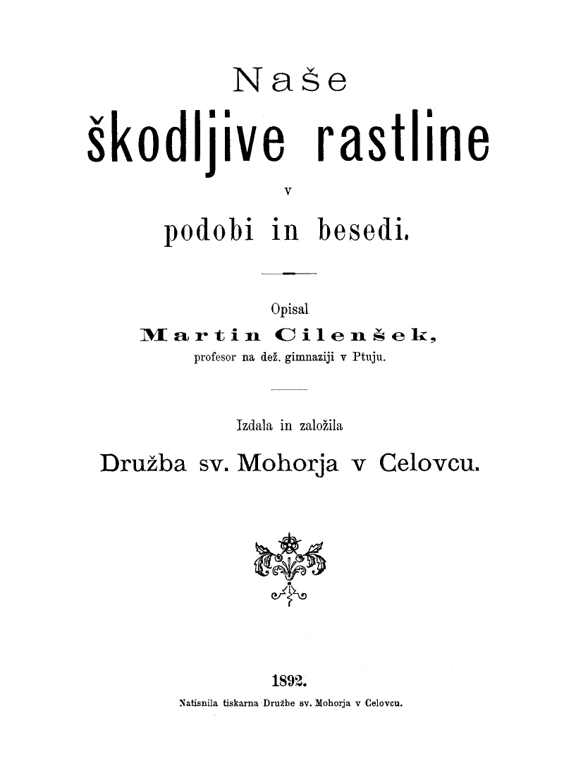 Title page of Naše škodljive rastline